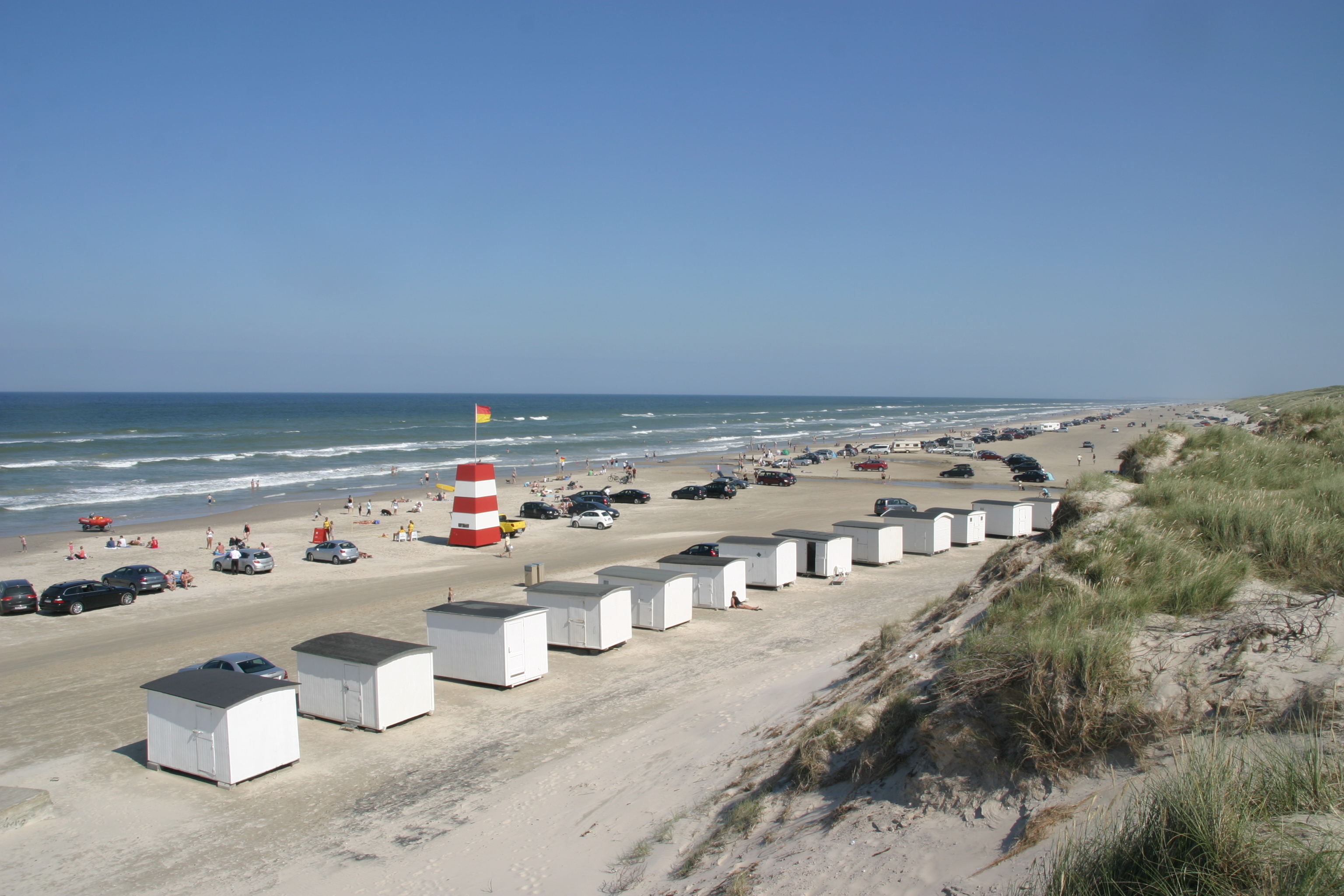 Blokhus Stranden Danmark